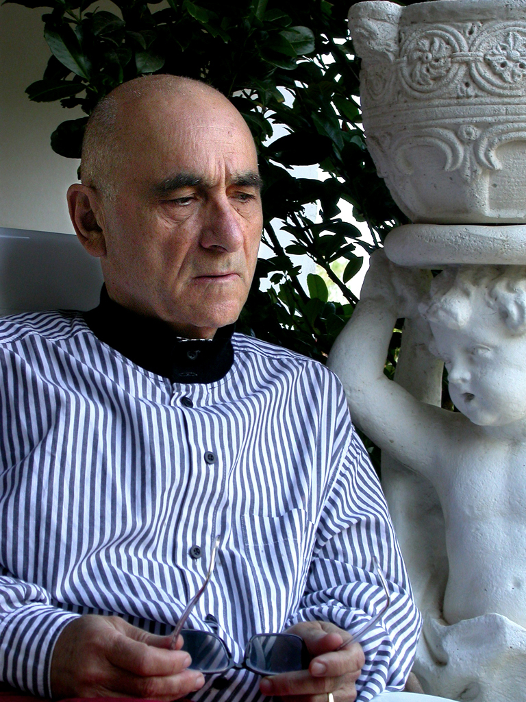 Giovanni Battista De Andreis nel 2005